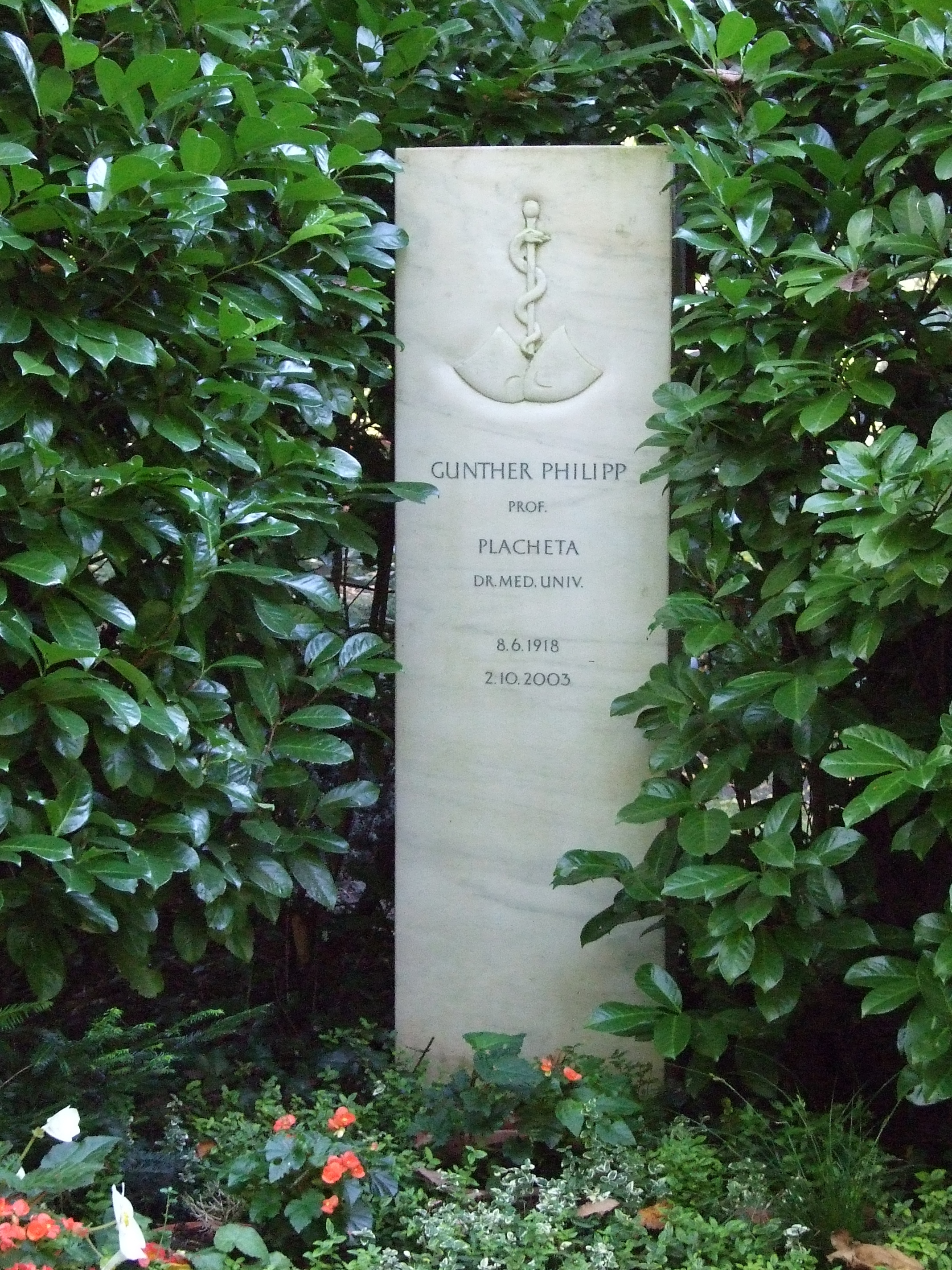 Köln-Melaten, Grabstätte Gunther Philipp Detail